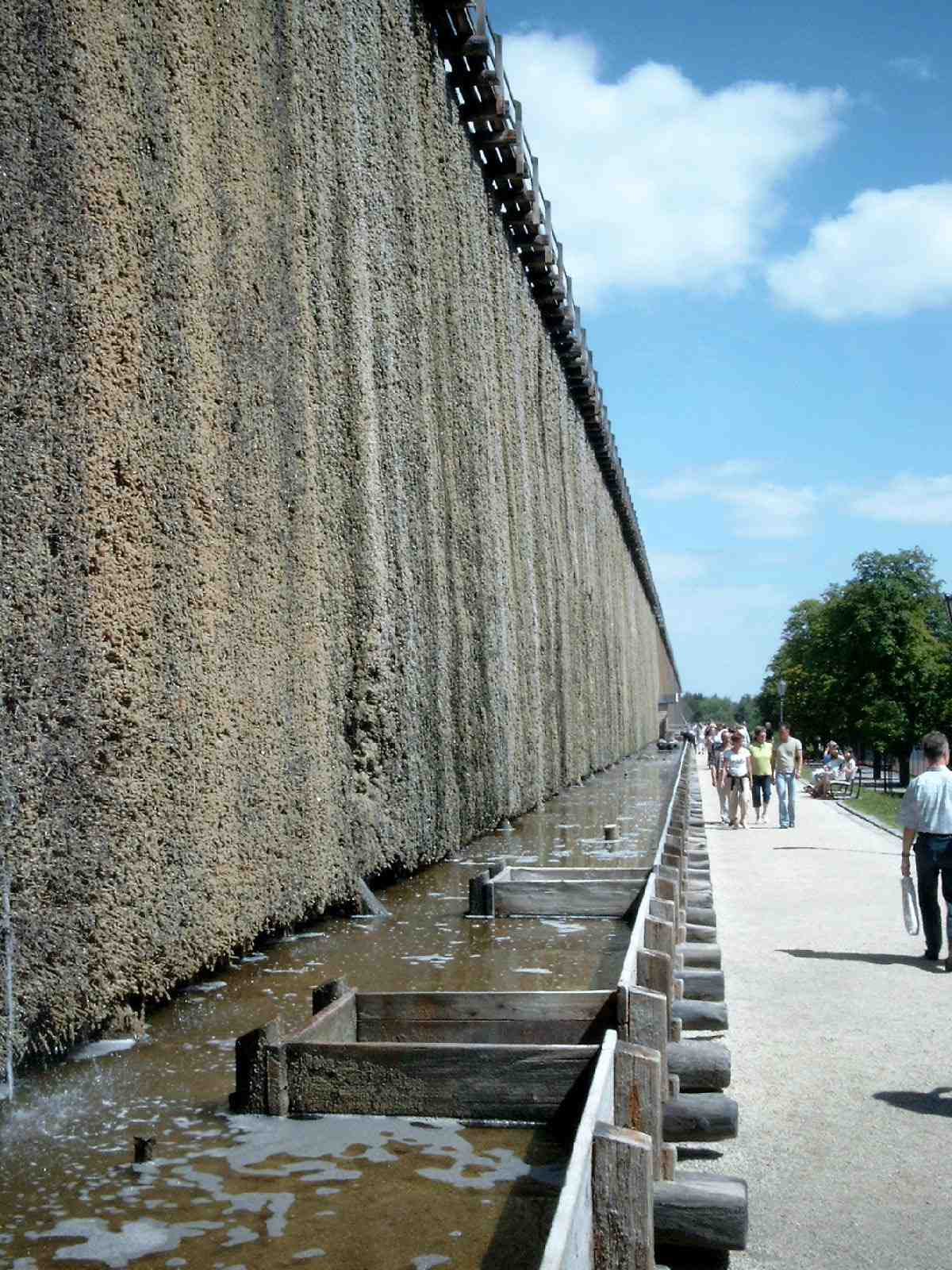 Die typischen Gradierwerke Bad Rothenfeldes aufgenommen im Sommer 2003